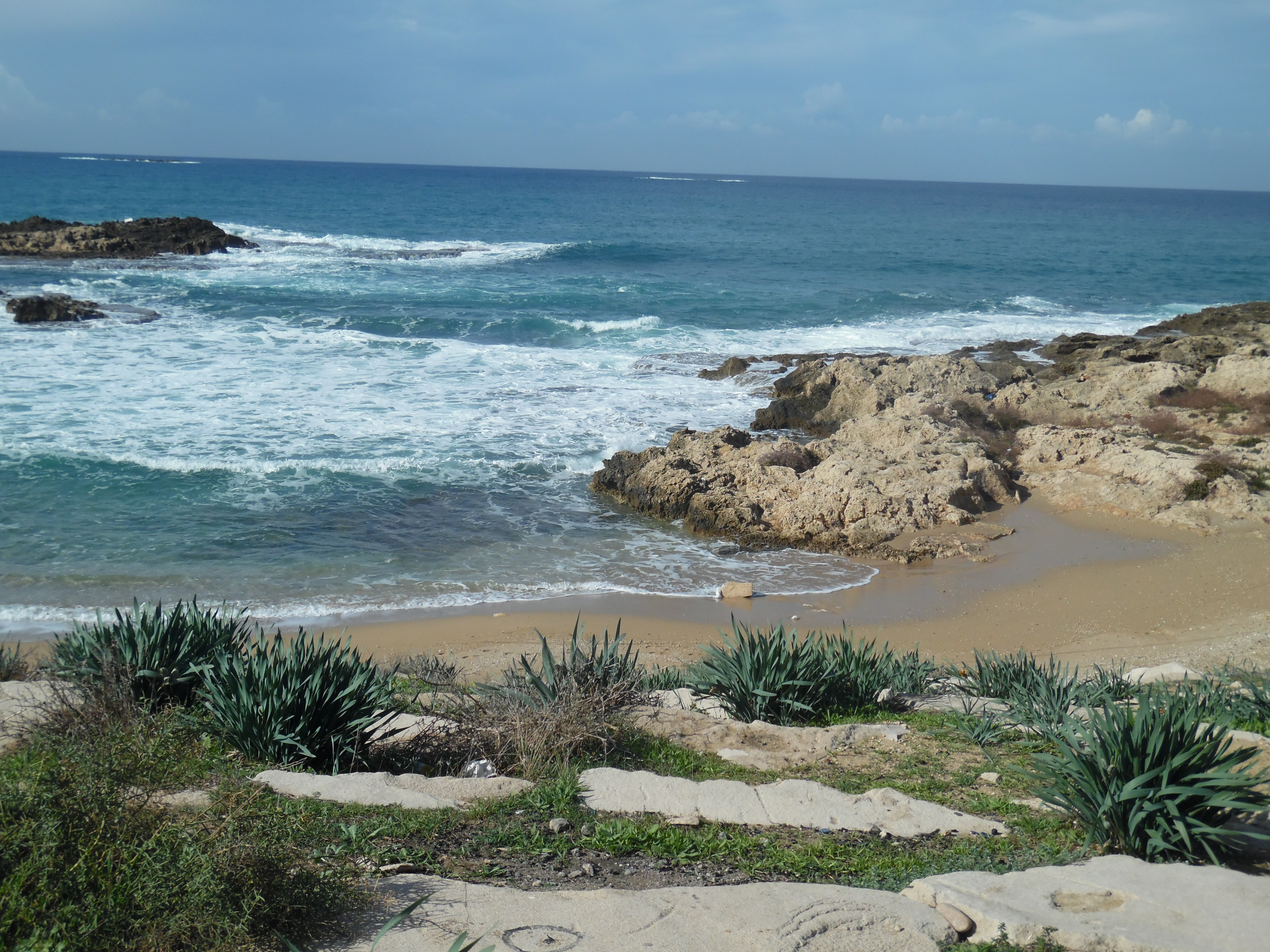 אכזיב חורף 2015